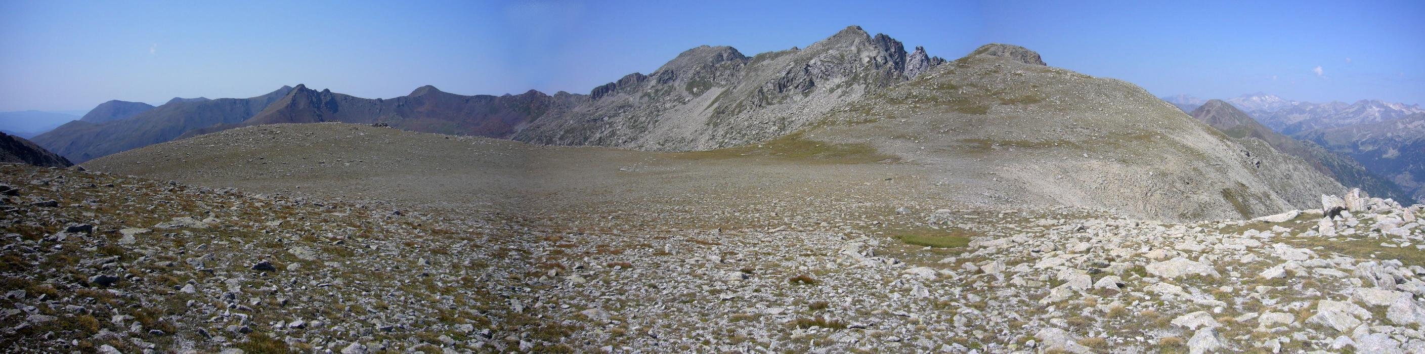 Coll Pla de Dalt vist des del seu extrem oriental; La Torre de Cabdella, Pallars Jussà, Catalunya